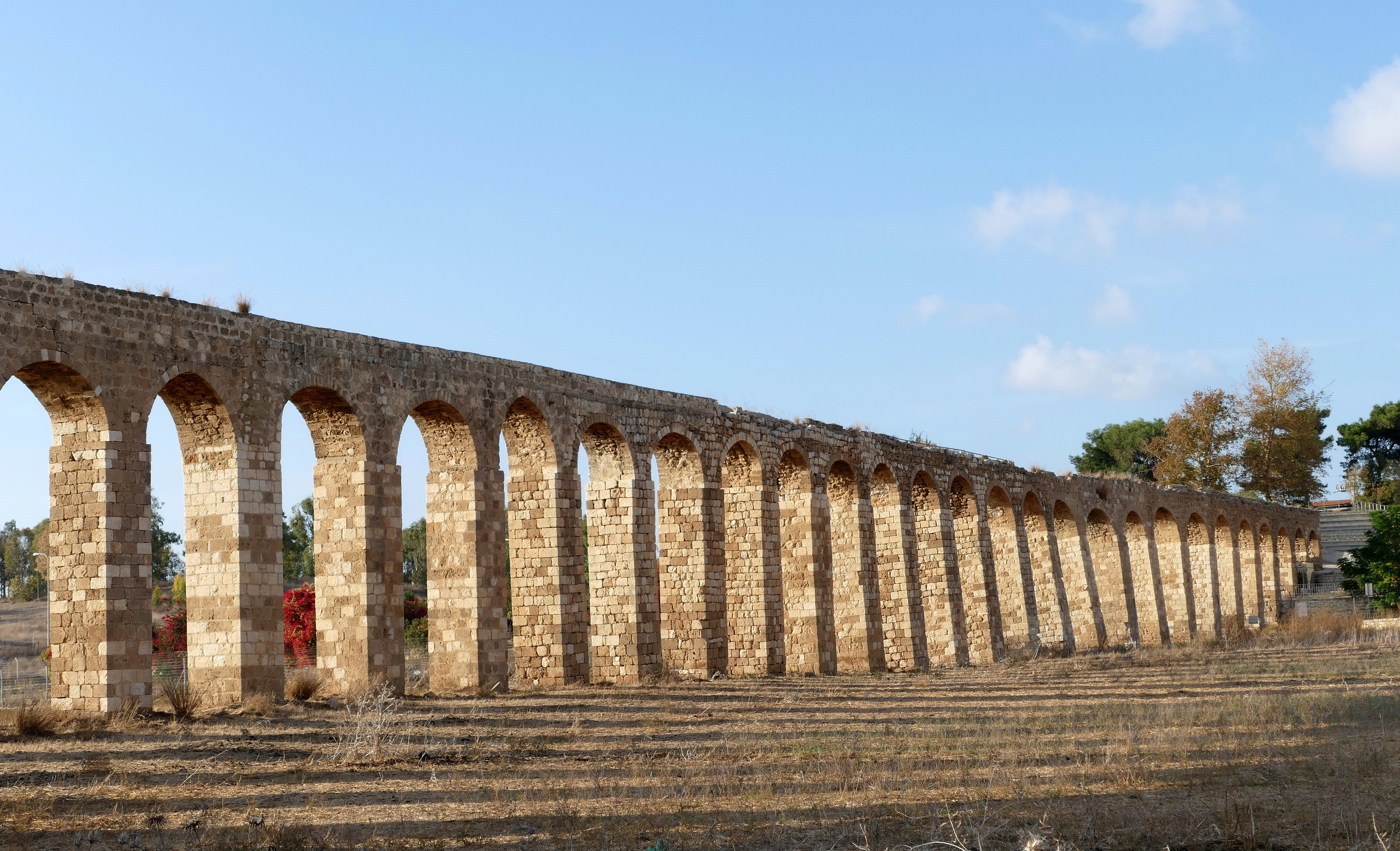 אמת עכו היא אמת מים שהובילה מים מאזור כברי אל העיר עכו. אמה זו ששרידיה נראים עד היום בתחומי העיר עכו ומצפון לה, נבנתה על ידי סולימאן פאשה, והייתה האמה השלישית ששירתה את העיר. קדמו לה אמה הלניסטית ואמה שהוקמה על ידי אחמד אל-ג'זאר ונהרסה בידי נפוליאון בשנת 1799.